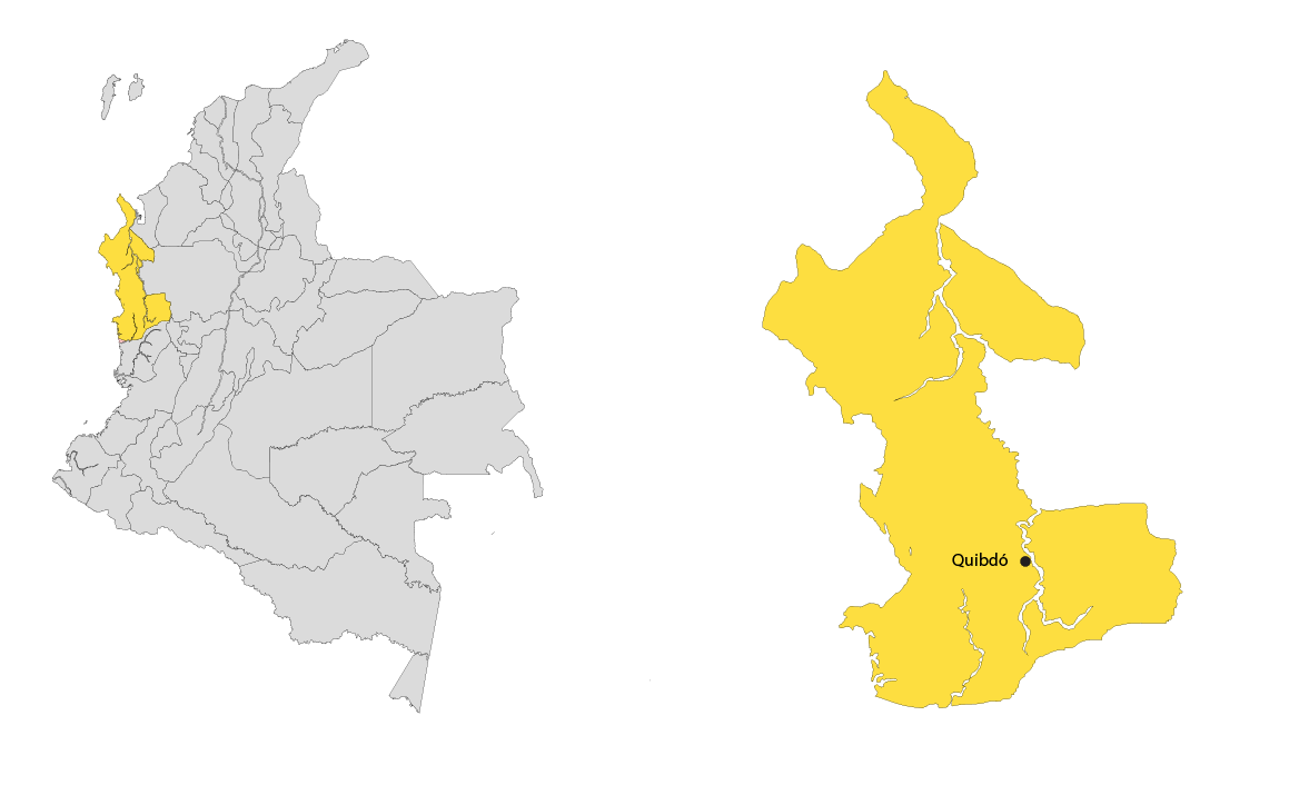 Eje musical del Pacífico Norte